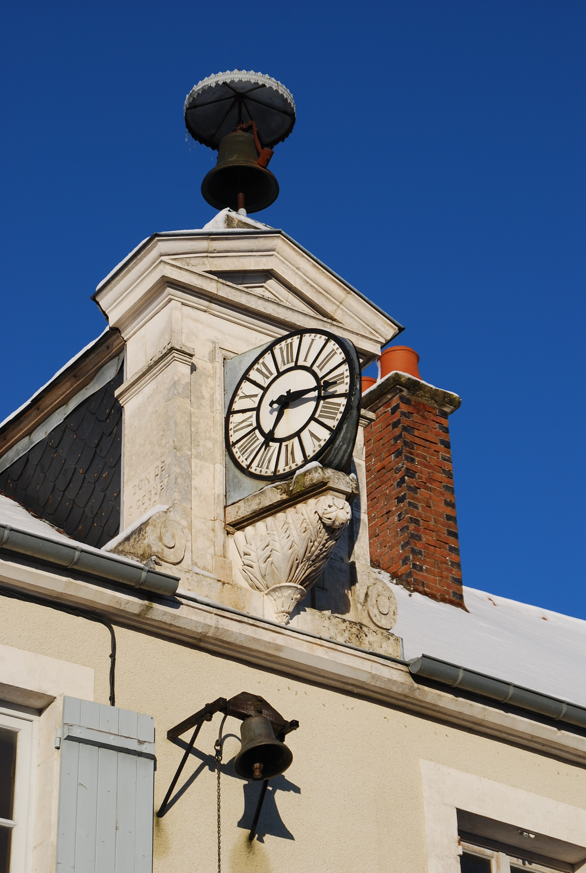 CLOCK